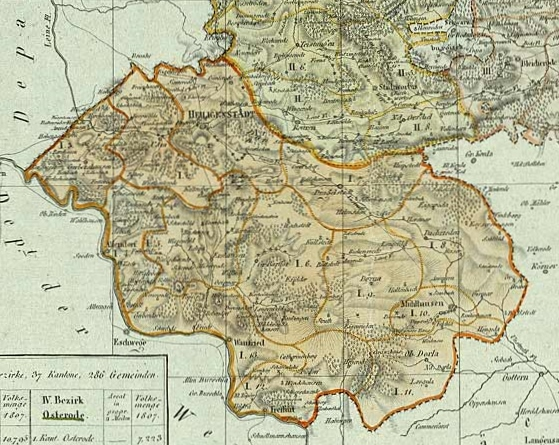 Charte von dem Departement des Harzes des Königreichs Westphalen: Ausschnitt Distrikt Heiligenstadt